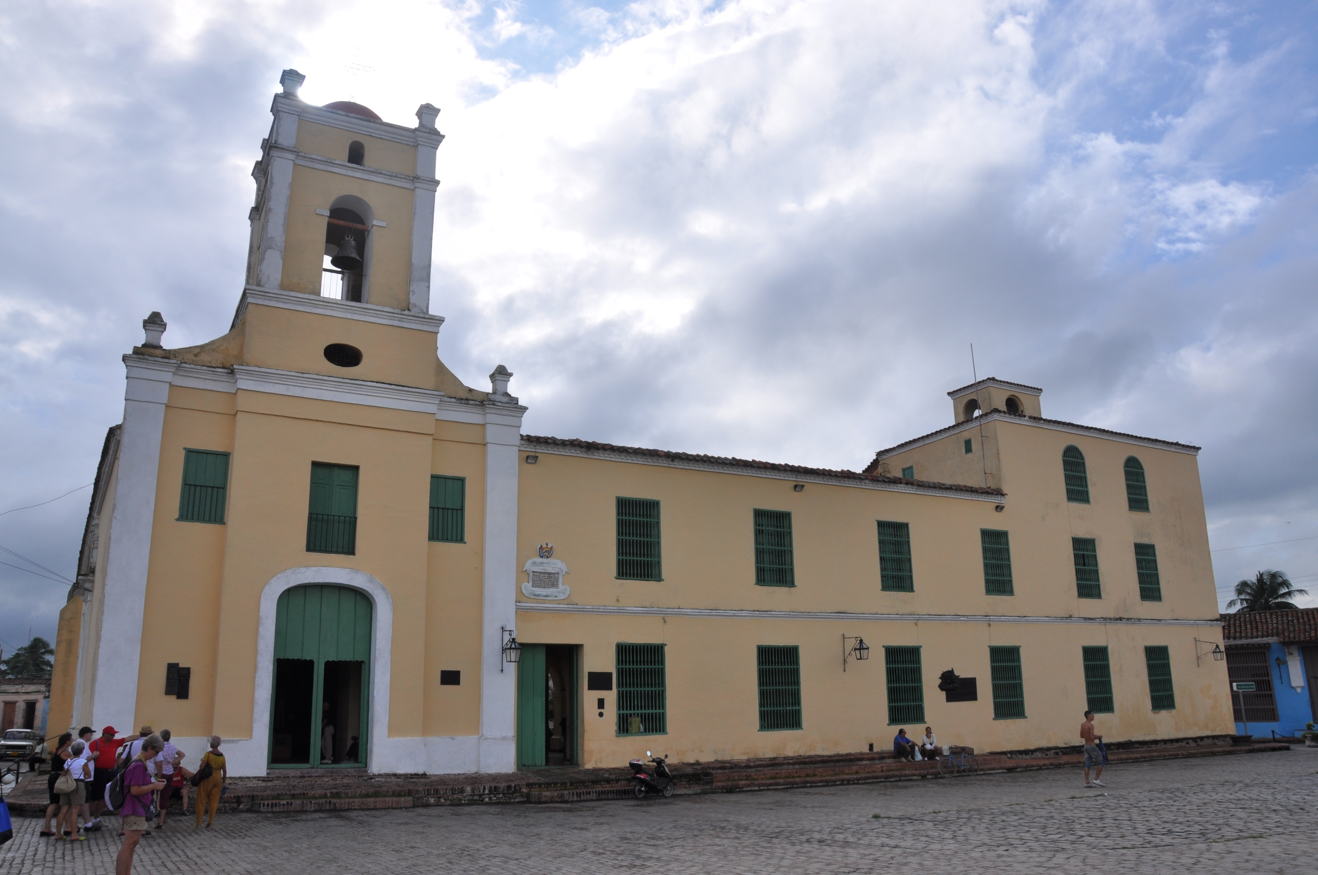 Extérieur de l'église San Juan de Dios à Camagüey, Cuba